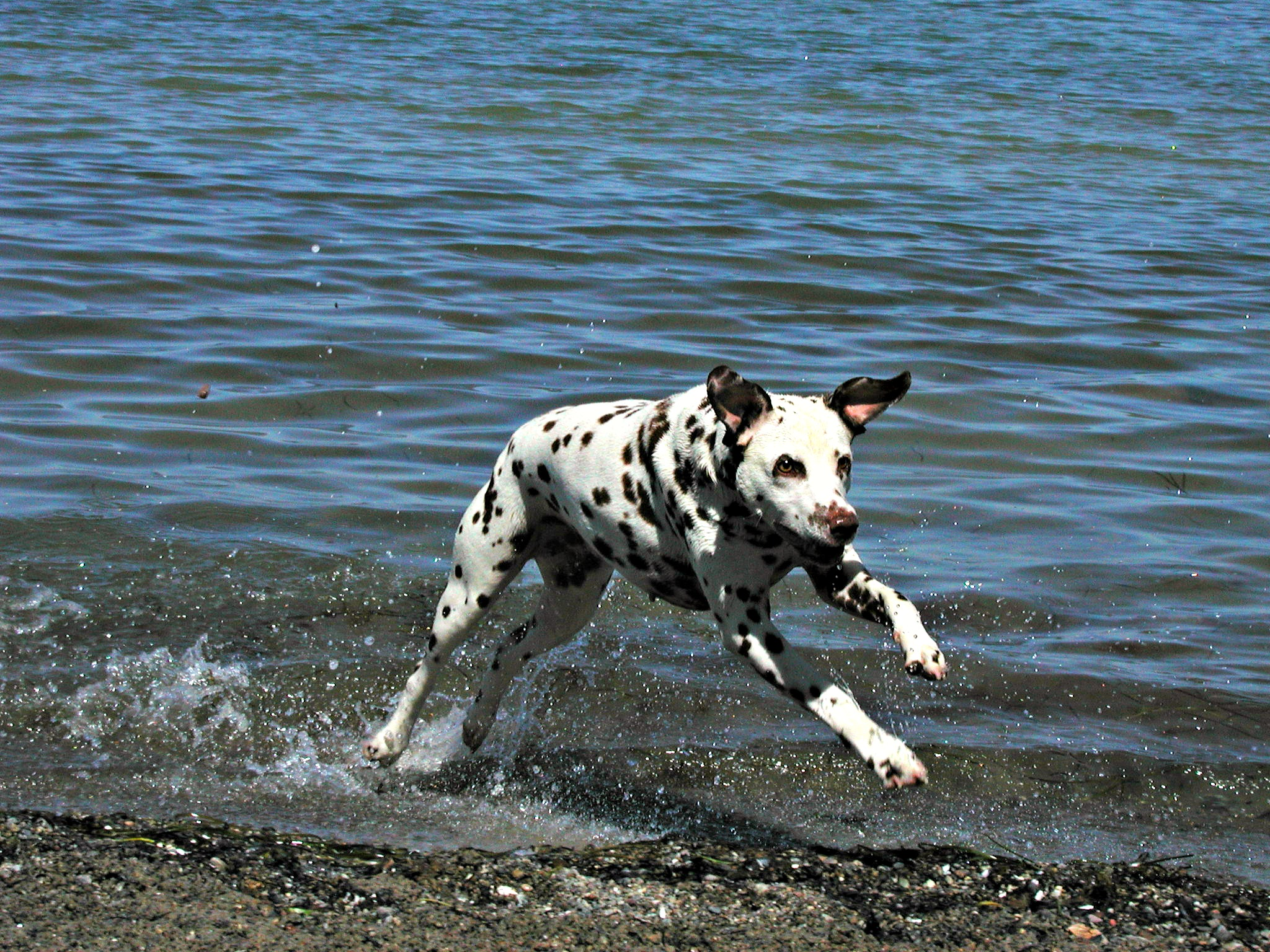 m.hartig